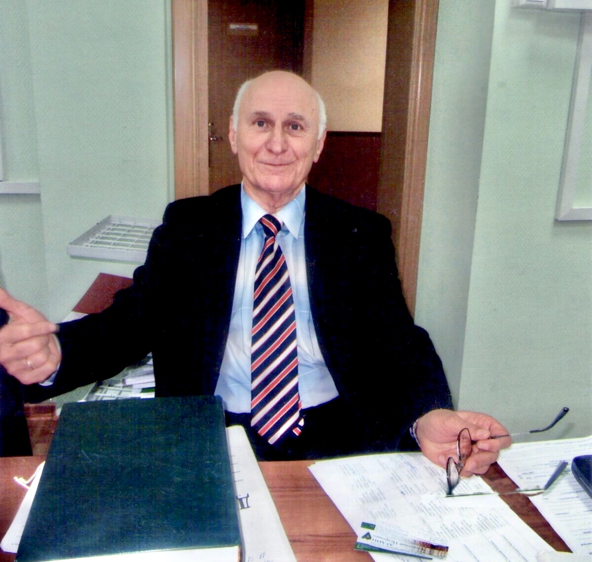 Б. С. Гегечкори на заседании экспертного совета ВАК Минобрнауки РФ 04.12.2012 г.